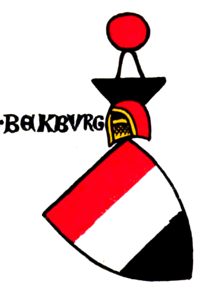 Wappen der Bechburg (Bekbvurg)